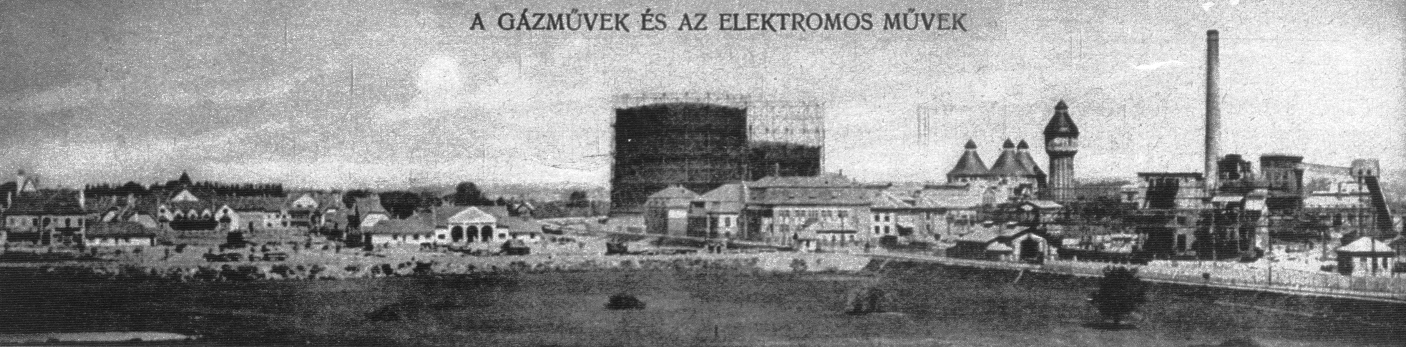 Az egykori Óbudai Gázgyár és a Budapesti Elektromos Művek